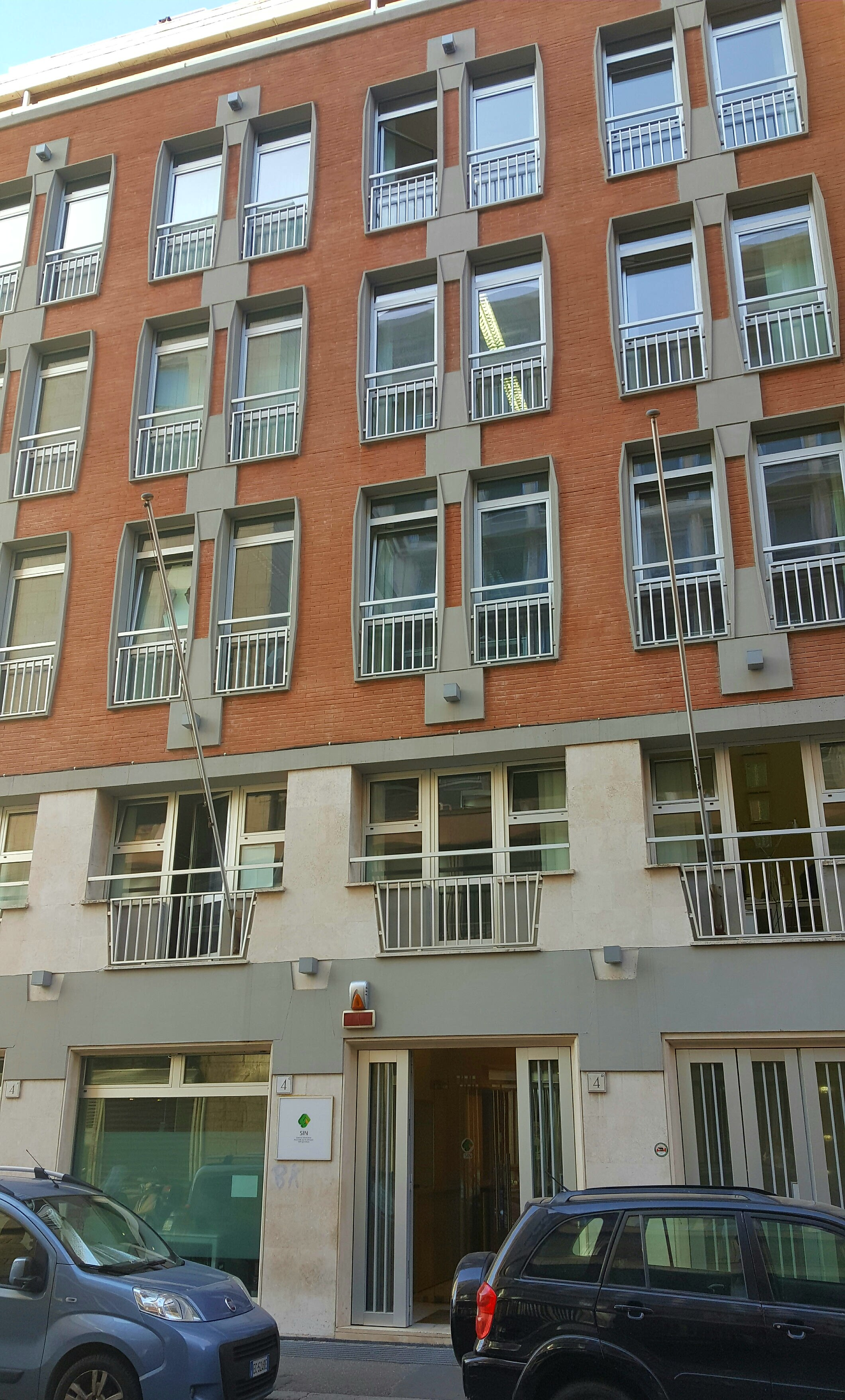 Sede SIN SpA a Roma, Via Sommacampagna, 4.